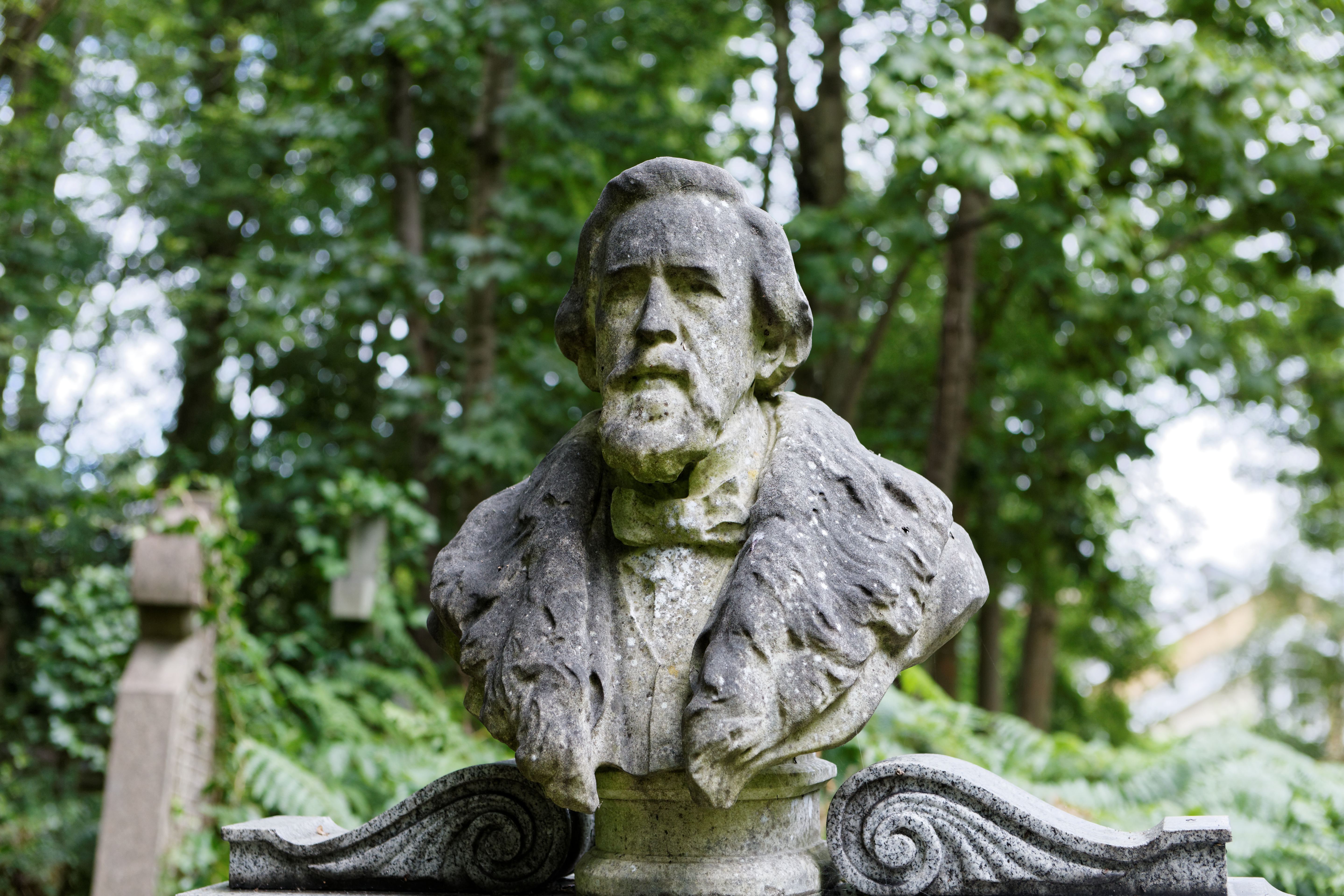 Sépulture de George Holyoake (1817-1906), militant de la séparation de l'Église et de l'État, qui inventa le terme anglais « secularism ».